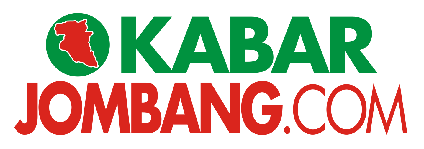 Kabar Jombang | Lebih Tahu Jombang | Berita Jombang Online